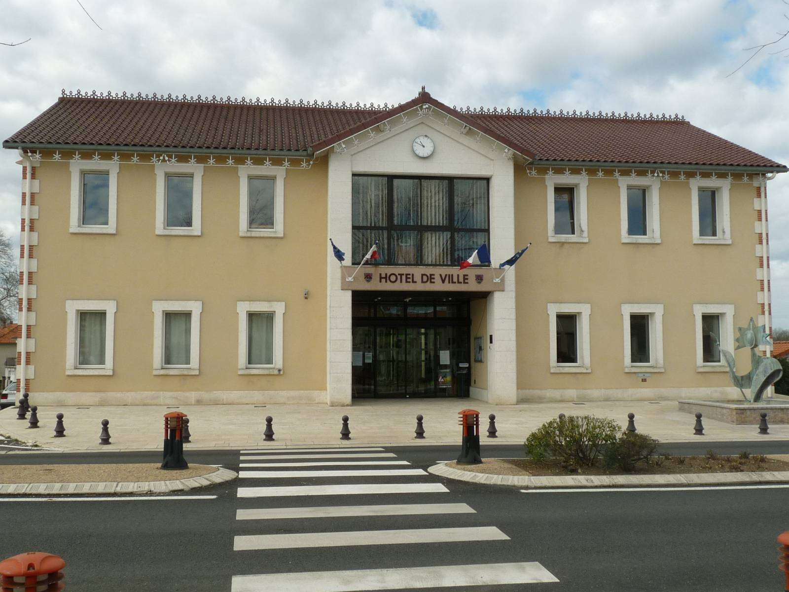 mairie de Roumazières-Loubert, Charente, France